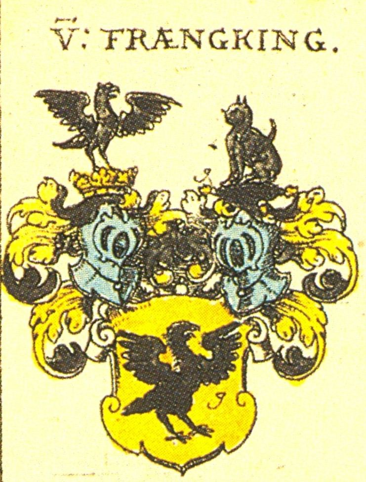 Wappen des Bayerischen Adelsgeschlechts Frängking (Franking) aus dem Wappenbuch Siebmacher 1605